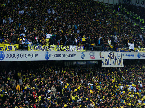 Şükrü Saracoğlu Genç Fenerbahçeliler